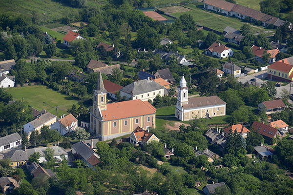 Kővágóörs templomai a levegőből